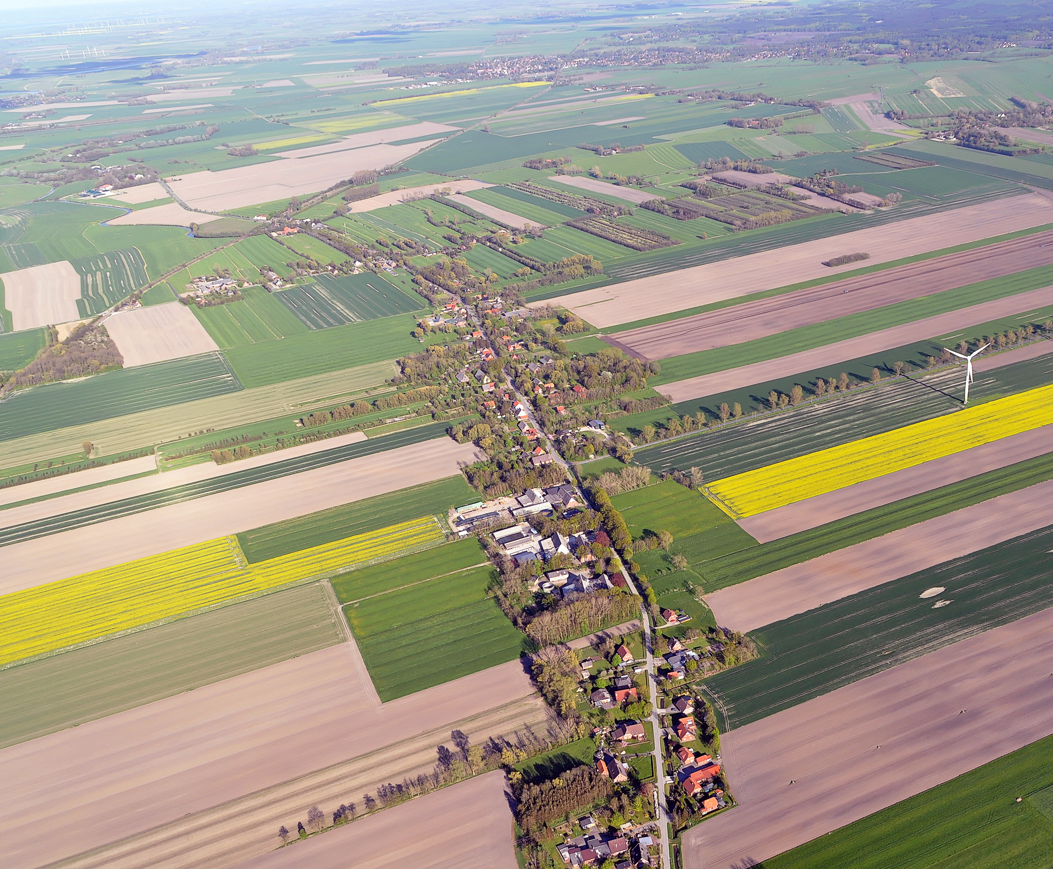 Luftbilder von der Nordseeküste 2012-05